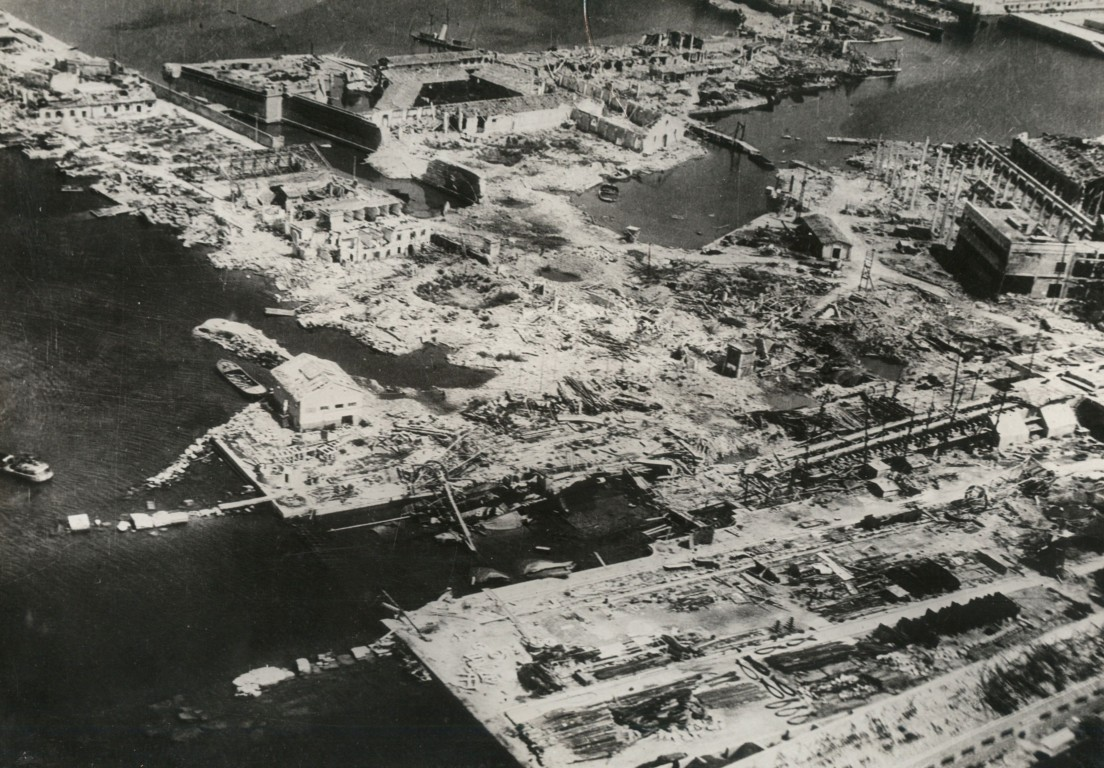 Ripresa aerea del Cantiere Orlando e della zona dello scalo Morosini dopo i bombardamenti effettuati durante la ricognizione aerea americana, Livorno 1944 (AS Livorno, Archivio storico del Cantiere navale Luigi Orlando, 1944)